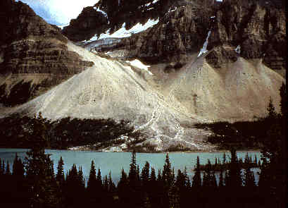 "Talus cones formed by rock slides in the Canadian Rockies" - "Durch Felsstürze entstandene Talus-Kegel in den kanadischen Rocky Mountains"